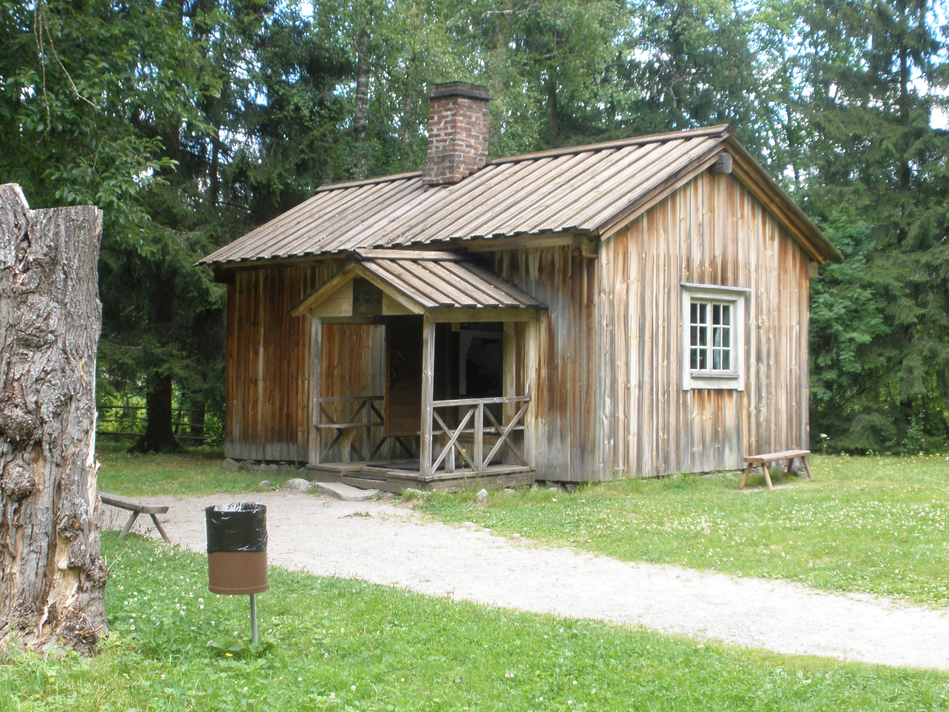 Cabin from Aleksis Kivi Died